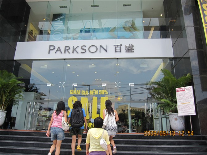 越南河内的百盛商场。